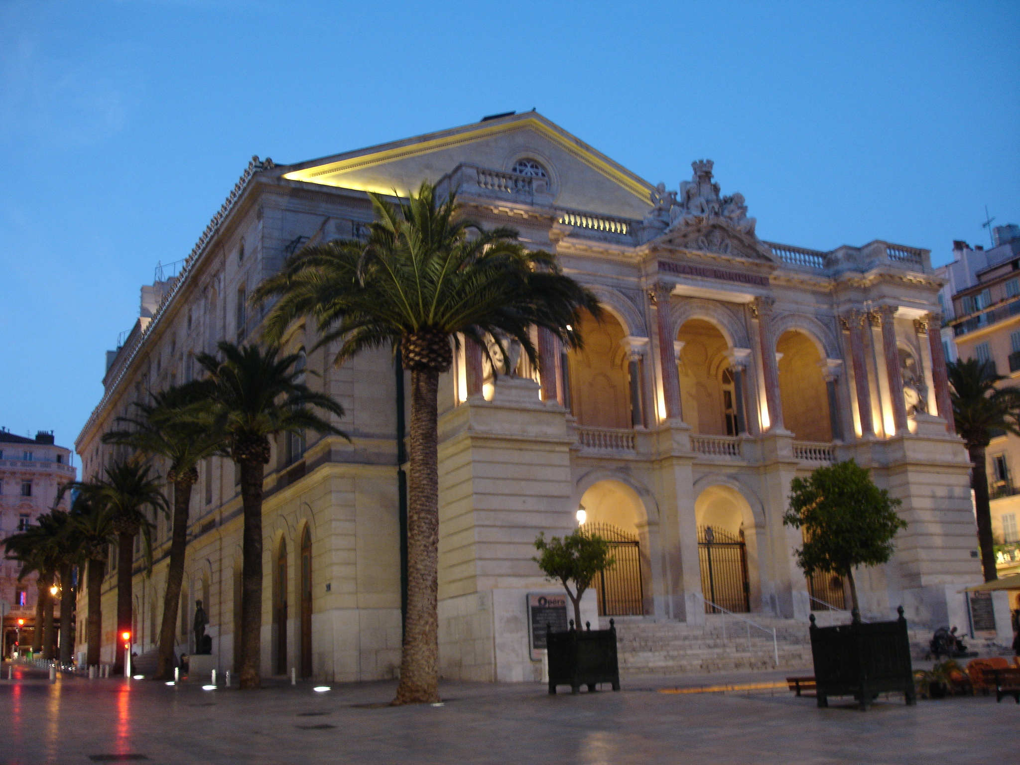 France, Var (83), Toulon, opéra de nuit .